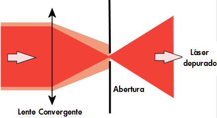 Filtro espacial: laser depurado.